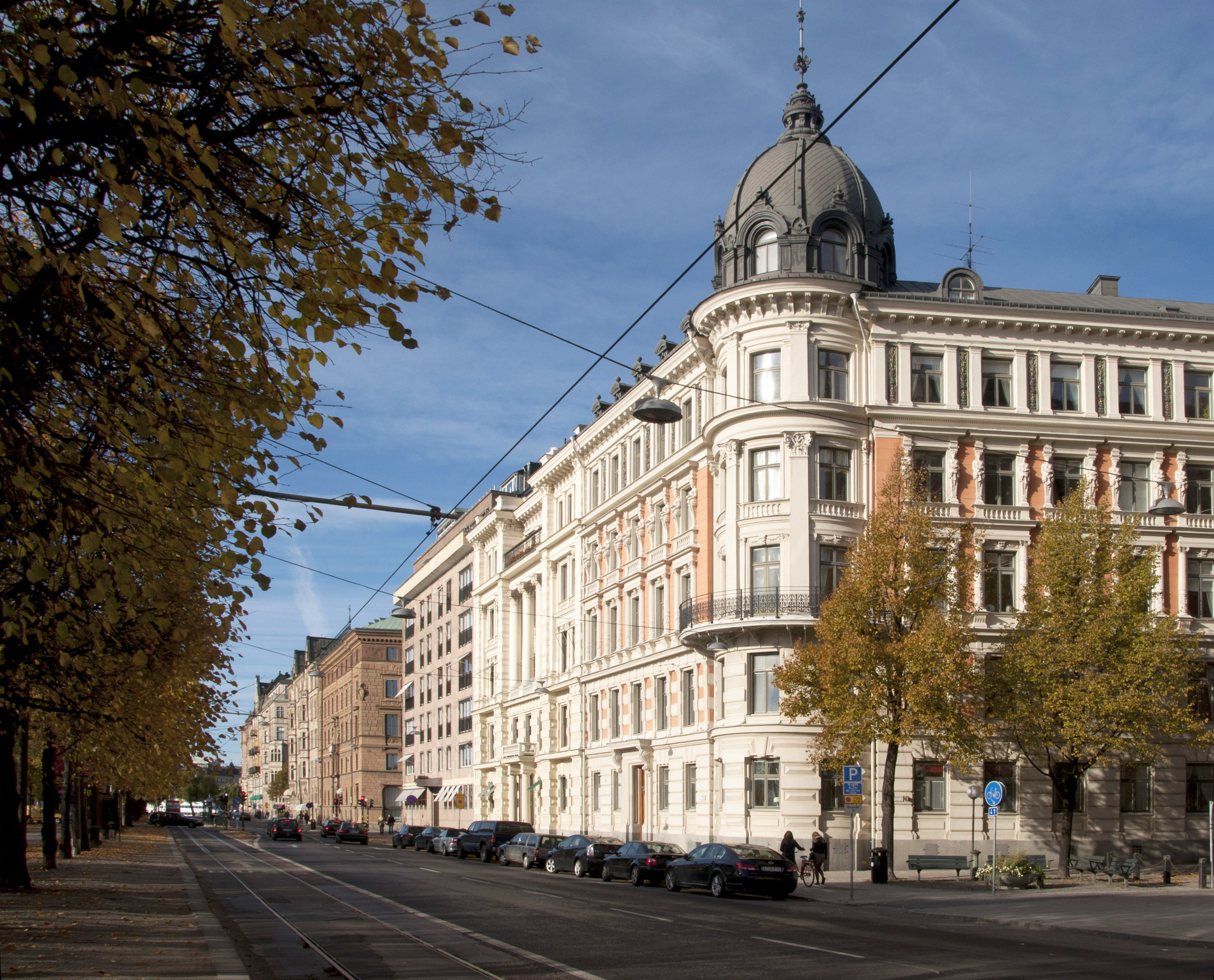 23: Byggnadsår 1959-67, arkitekt Nils Tesch, byggherre Rederi AB Rex, byggmästare Widmark & Platzer AB. 25: Byggnadsår 1882-83, arkitekt och byggherre Oskar Erikson, byggmästare Johansson & Hammarlund. 27: Byggnadsår 1882, arkitekt och byggherre Oskar Erikson, byggmästare Johansson & Hammarlund.